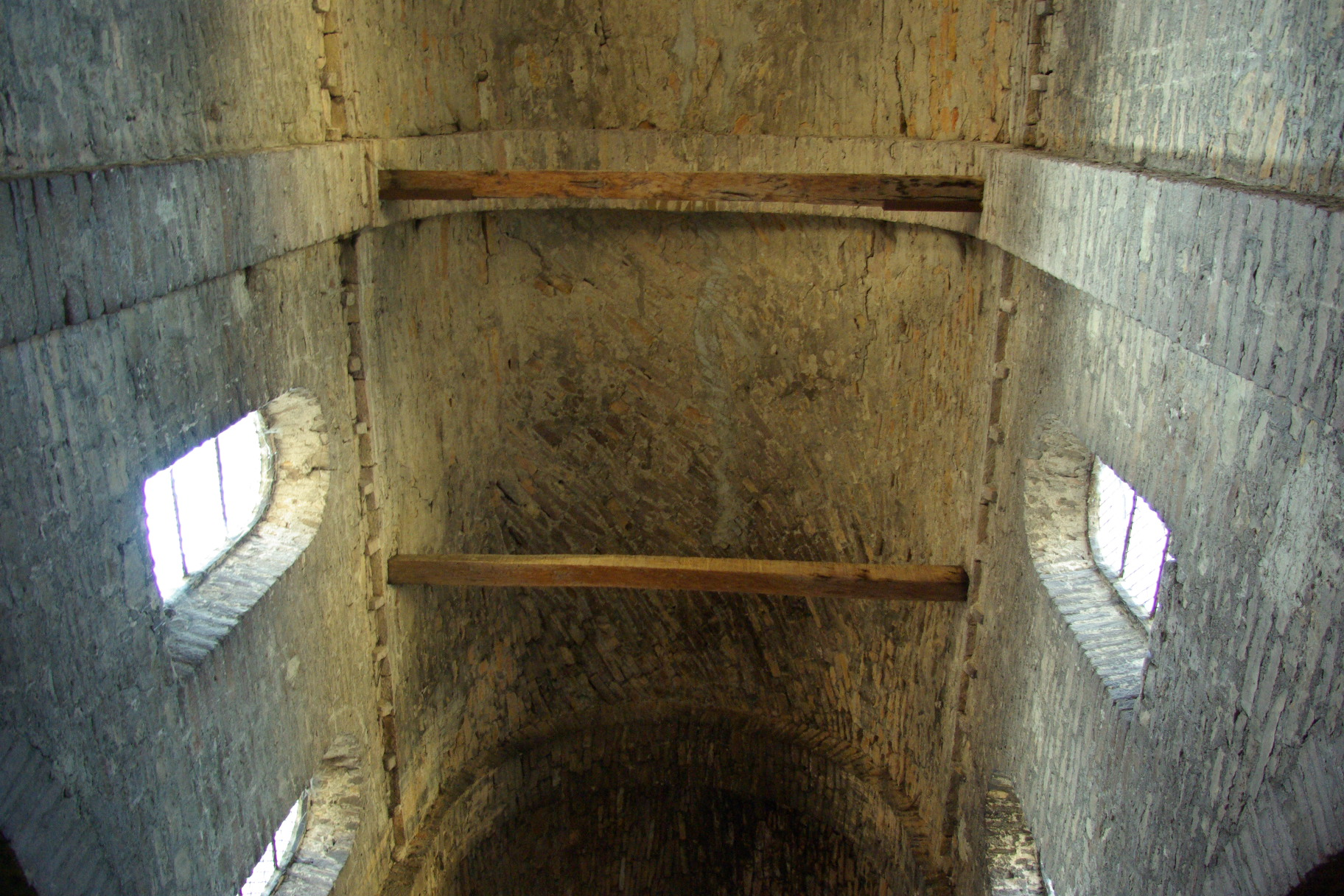 Voûtes du narthex de la chapelle Saint-Michel située au dessus du narthex de l'Abbaye Saint-Philibert de Tournus